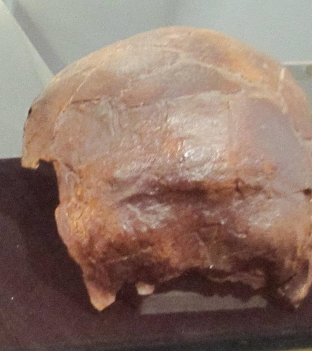 Cráneo BOU-VP-16/5 de H. sapiens idaltu